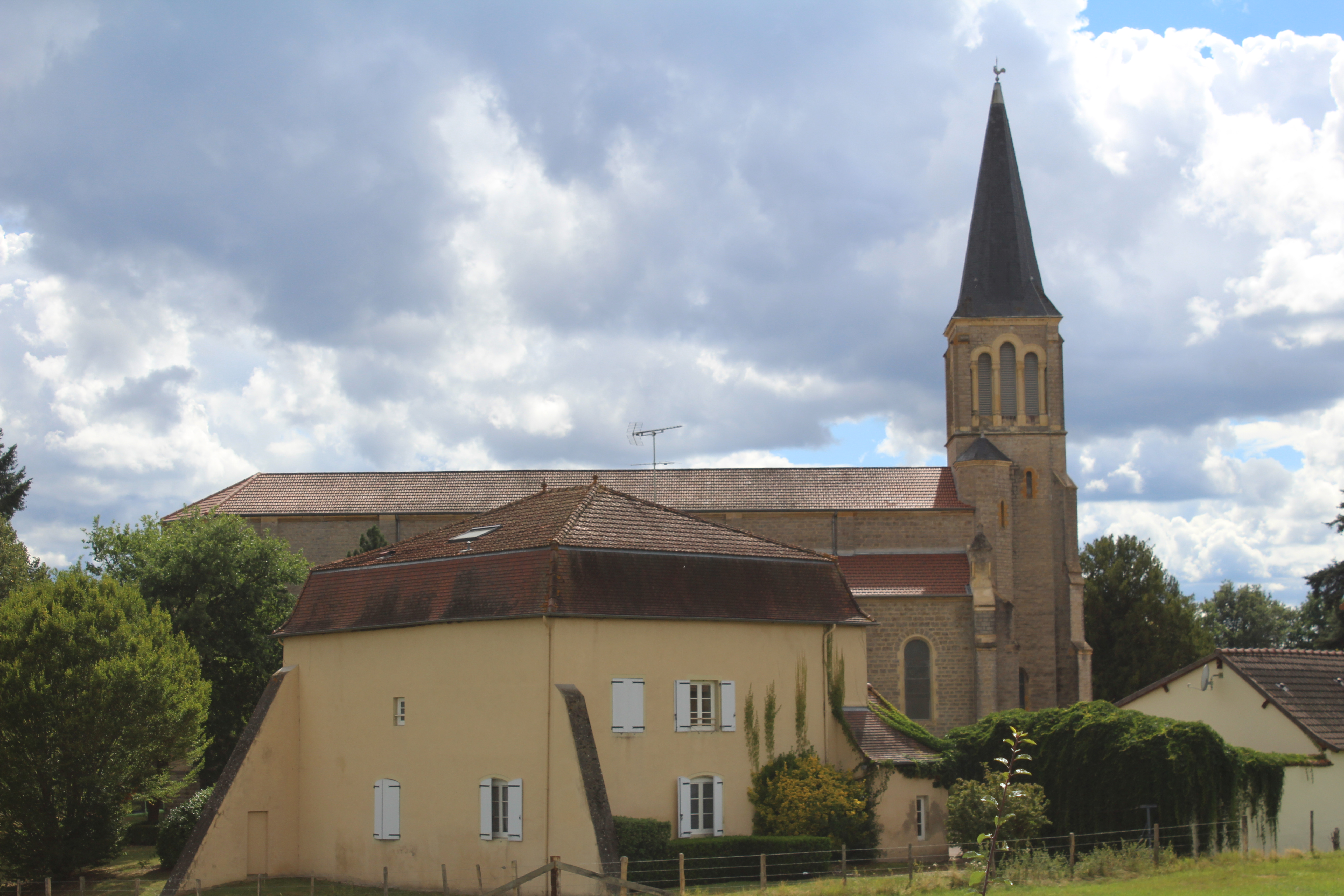 Église Saint-Martin de Chenay-le-Châtel.